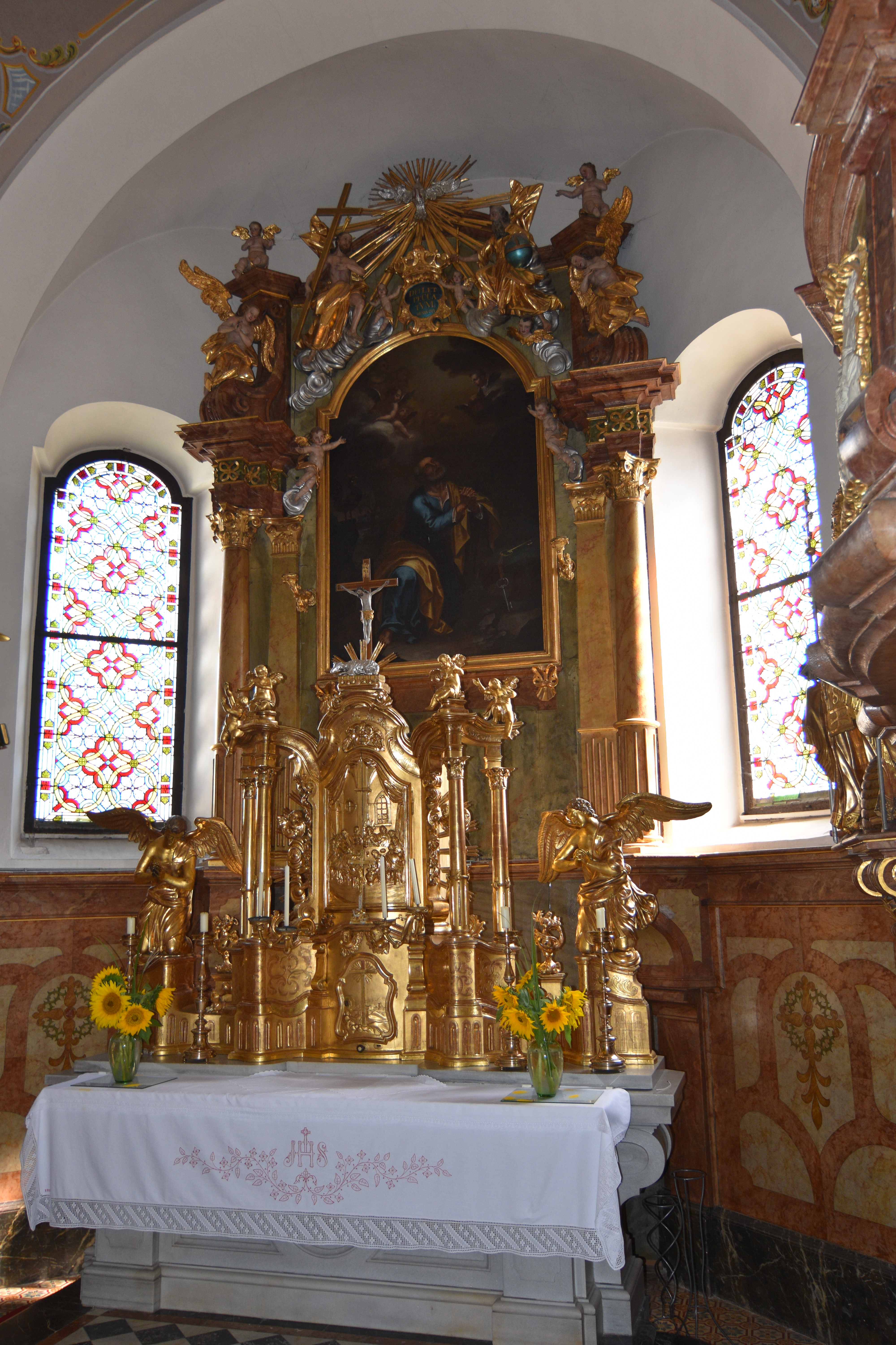 Pfarrkirche Sankt Peter am Ottersbach Interior